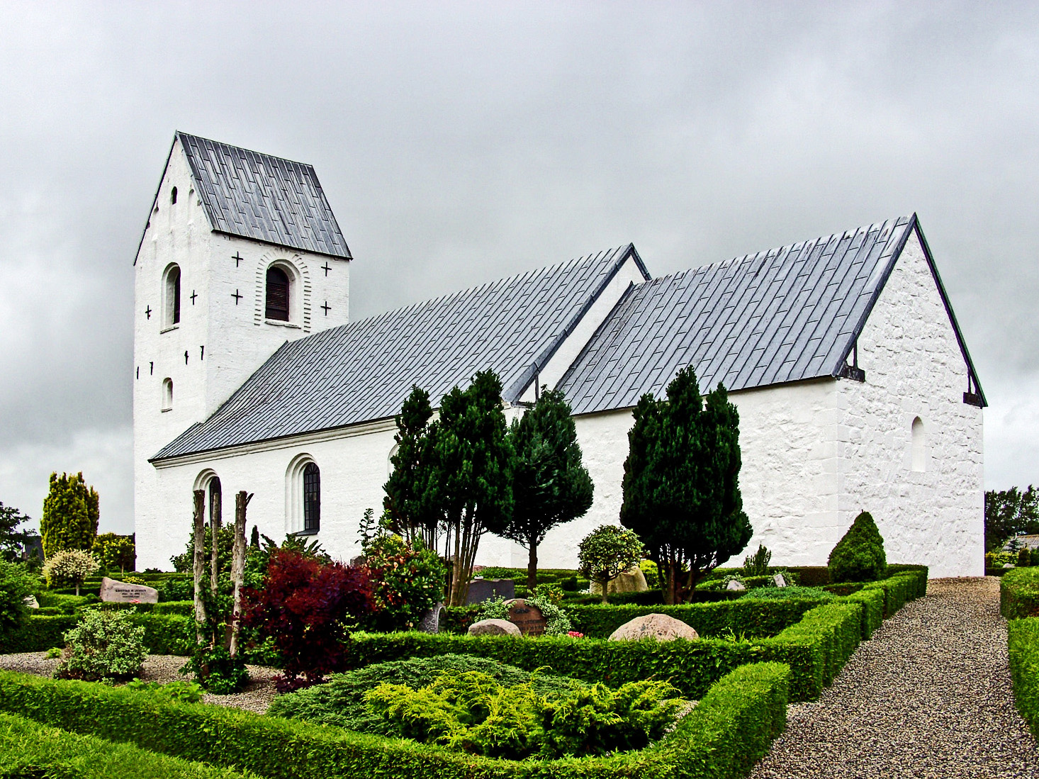 fra sydøst